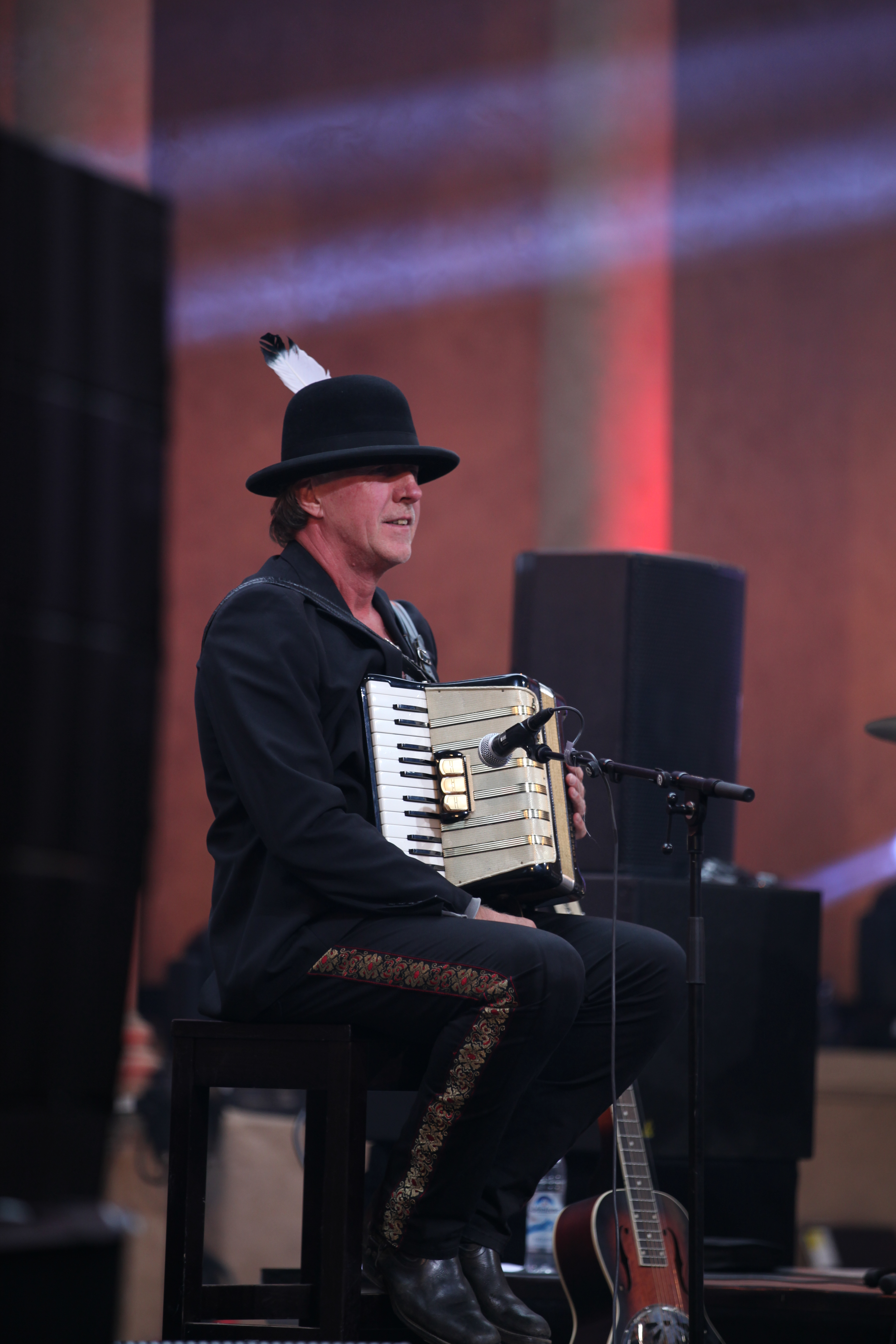 Hannes Ringlstetter mit Begleitmusikern auf dem Heimatsoundfestival 2015 Edgar Feichtner mit einem Hohner Akkordeon